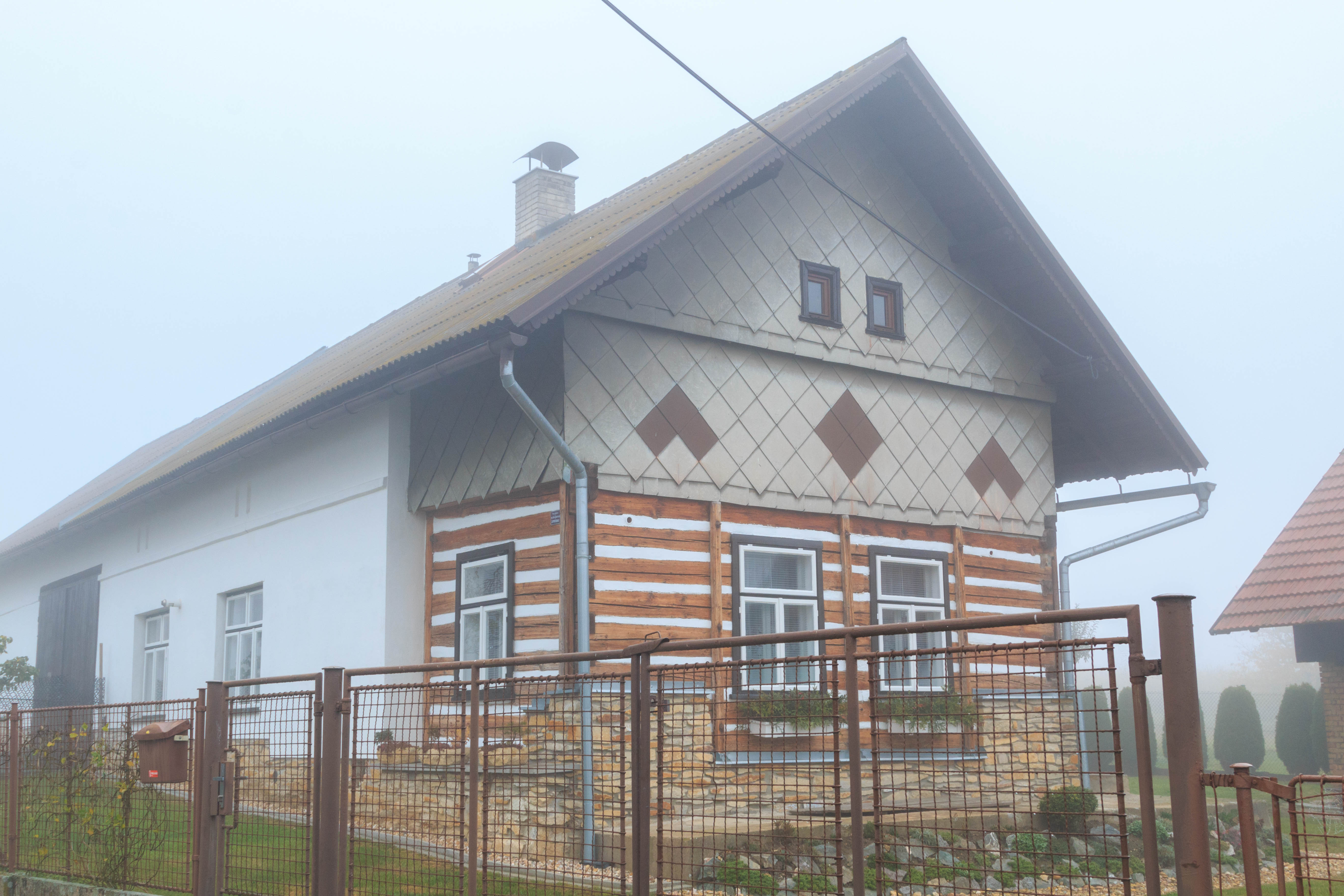 Ostašovice u Lična - čp. 1